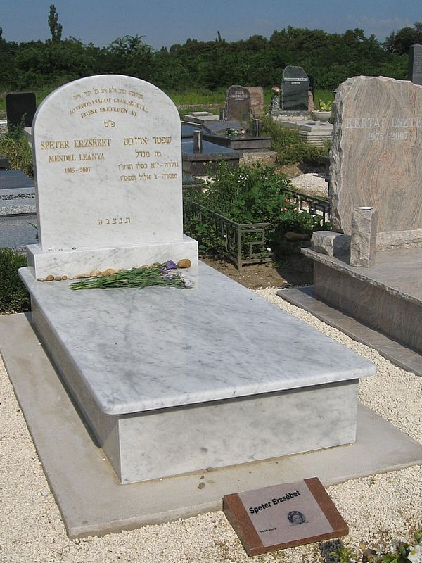 Spéter Erzsébet (1915. július 1. – Budapest, 2007. augusztus 17.) külföldre szakadt magyar, mecénás sírja Budapesten. Kozma utcai zsidó temető: 12/1-7-11.